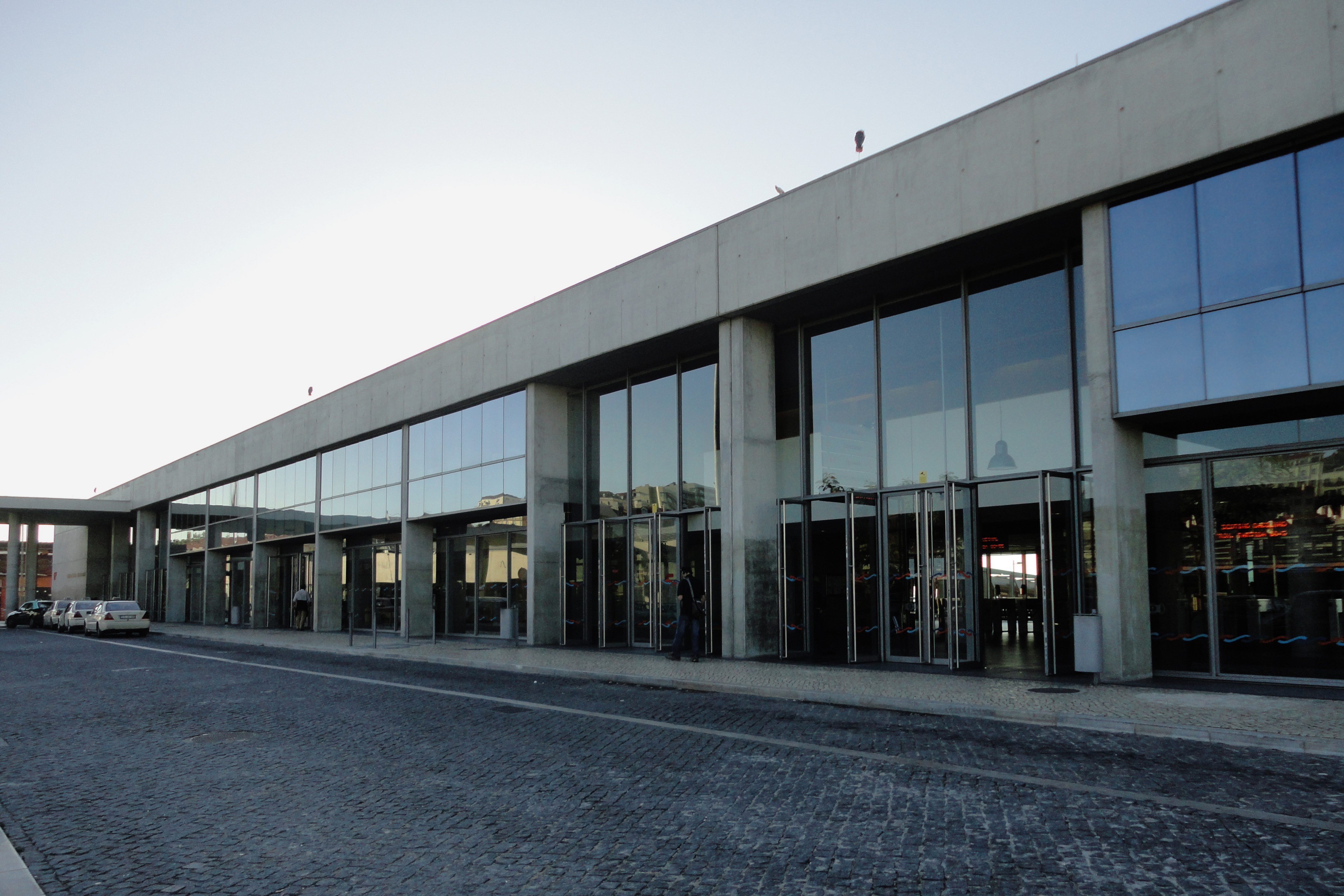 Terminal Fluvial, Cais do Sodré, Lisboa, 2012 (arquitetura: Pedro Botelho)